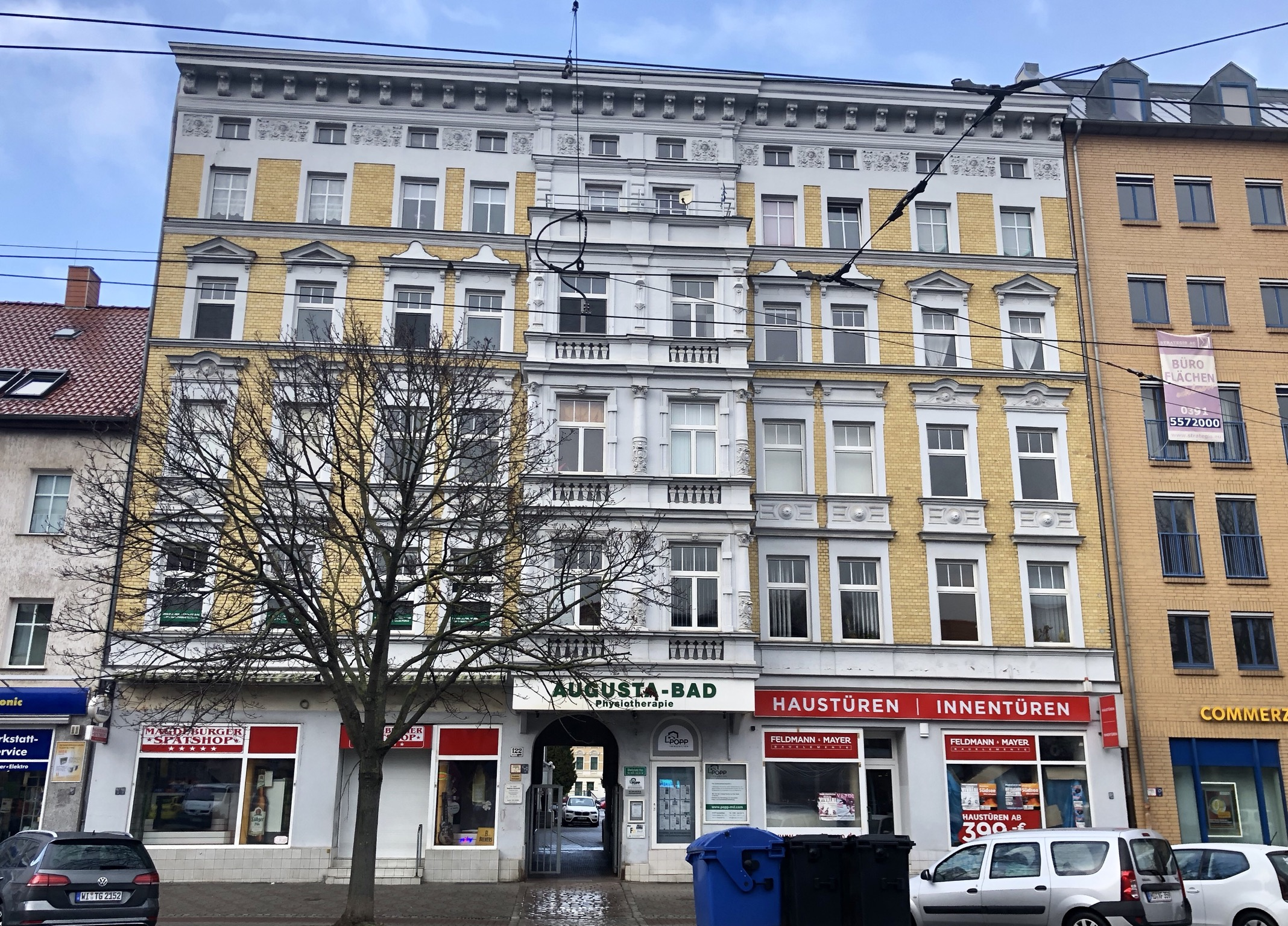 Halberstädter Straße 122 in Magdeburg